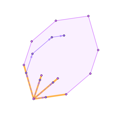 Отрезки, сумма которых является зоногоном, выделены оранжевым. Они не обязательно должны иметь общую вершину. Цепочка векторов показывает получение произвольной точки внутри зоногона в ходе построения суммы Минковского. Те же вектора изображены в изначальном виде от одной и той же точки к точкам отрезков.